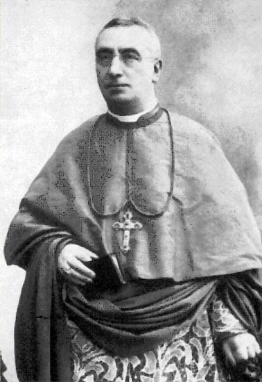 Benedetto Bonazzi, arcivescovo di Benevento